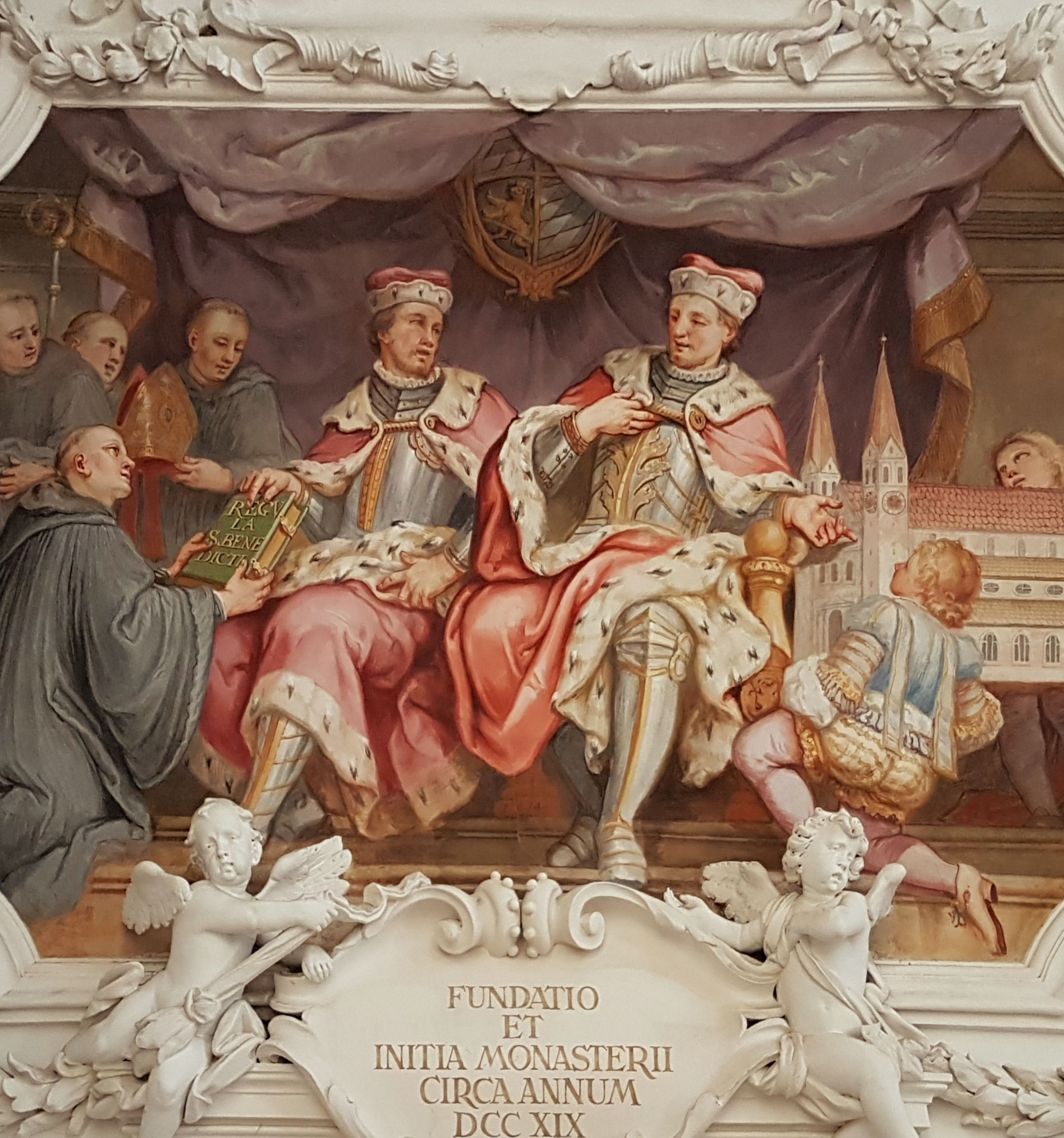 St. Quirin (Tegernsee), Wandfresko an der südlichen Westwand